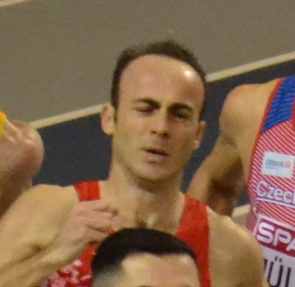 Mens 400m